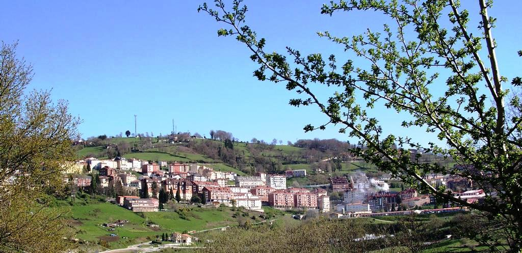 Vista de la villa de Tineo desde la carretera de El Rodical